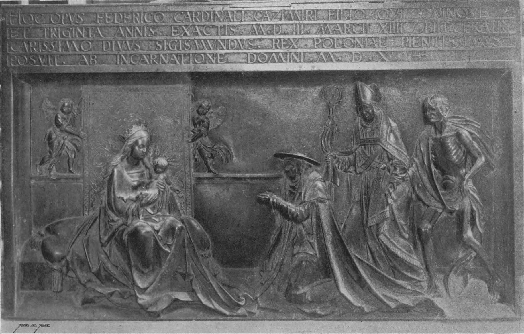 Płyta Fryderyka Jagiellończyka, dzieło warsztatu Piotra Vischera. Katedra wawelska, Kraków.